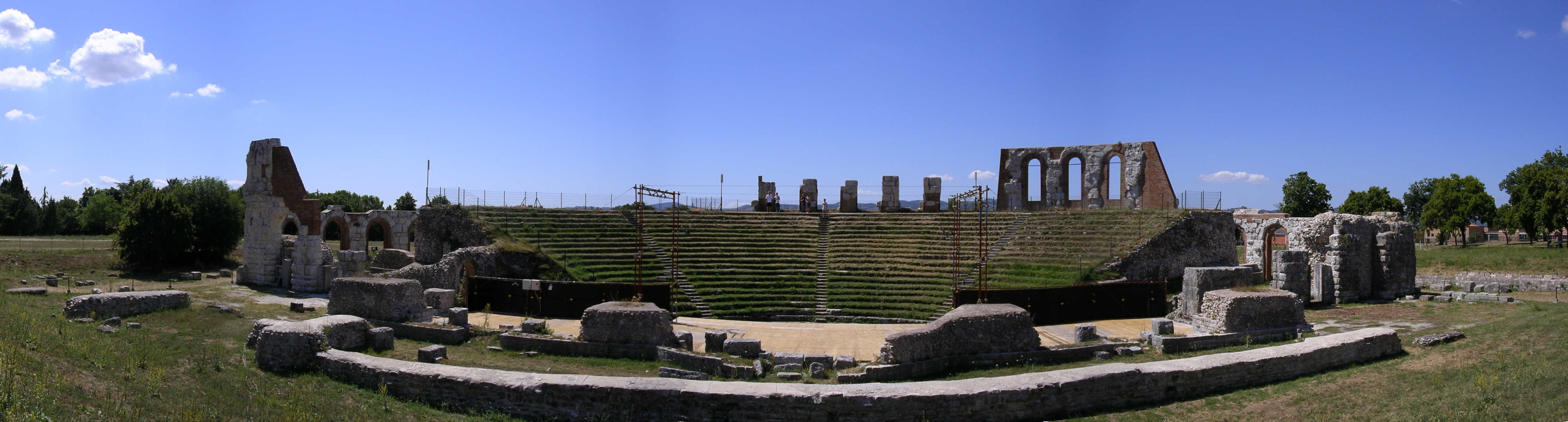 Teatro romano di Gubbio